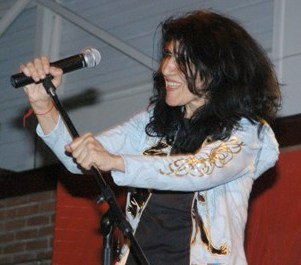 Esther Galil